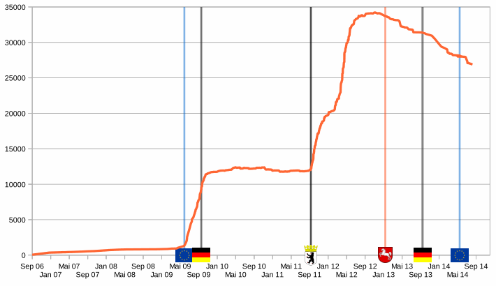 Mitgliederentwicklung Piratenpartei Deutschland seit Gründung Vertikale Linien: Wahlen (Europawahl, Bundestagswahl, Landtagswahlen und Kommunalwahlen)